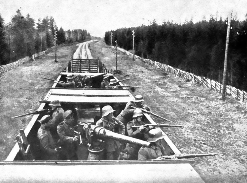 Deutsche Soldaten der Ostsee-Division in einem Panzerzug, auf einer Bahnstrecke bei Lahti, Finnland im April 1918.